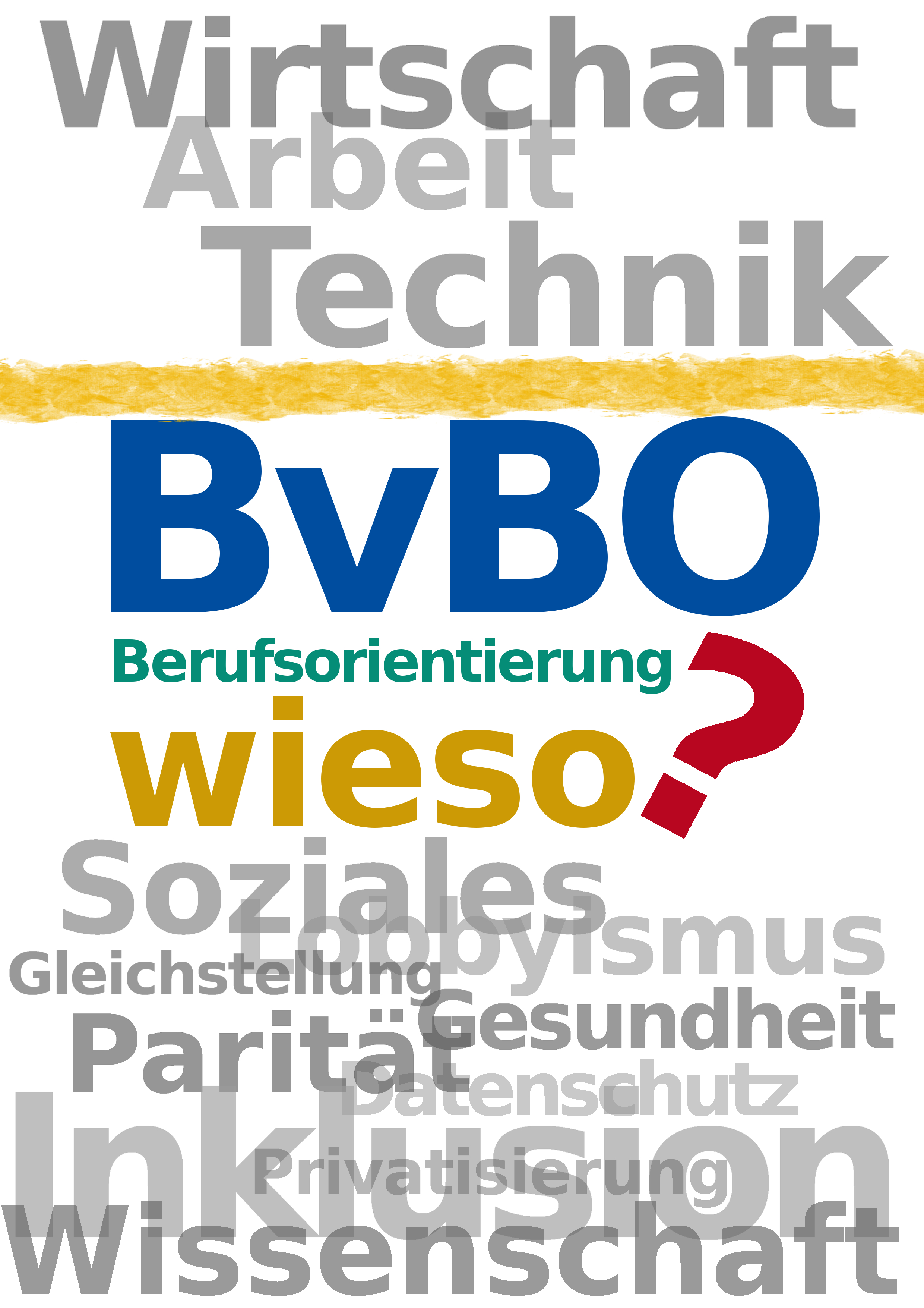 Diese Datei wurde unter unter den gleichen Bedingungen bereitgestellt